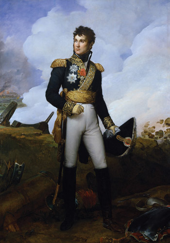 Le Maréchal Lannes, dernier Prince de Sievers.